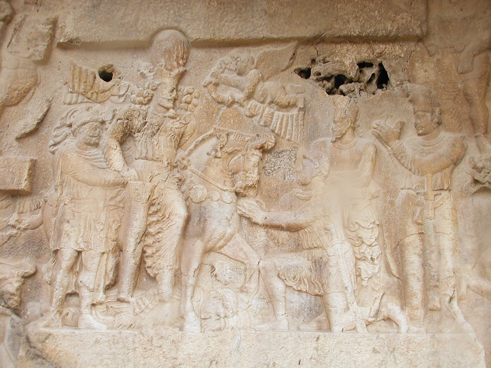 Cena central do segundo relevo de Bixapur no qual Sapor recebe a submissão daquele que foi identificado como Urânio Antonino.